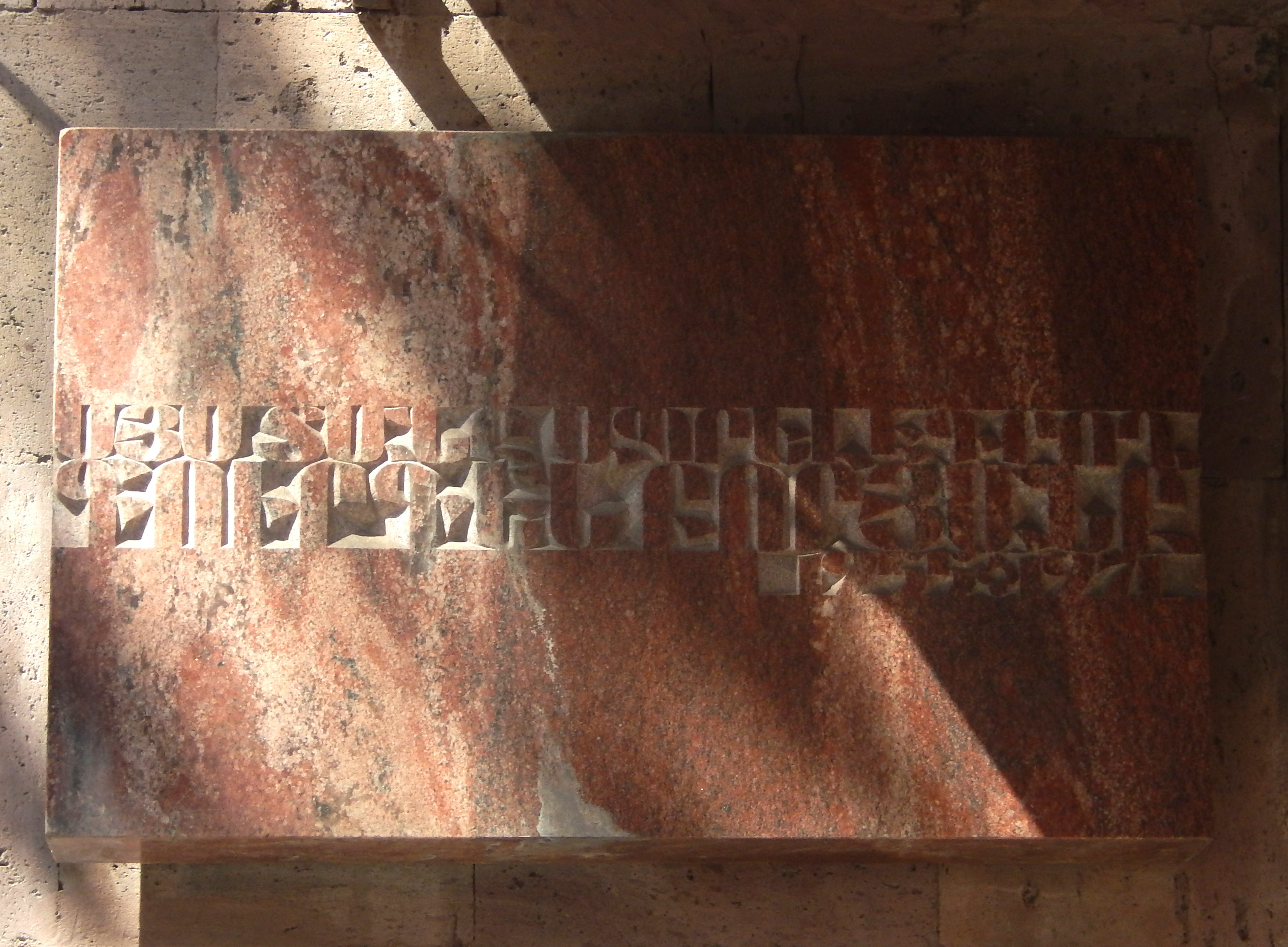 Plaque for Gourgen Boryan on Teryan street, Yerevan